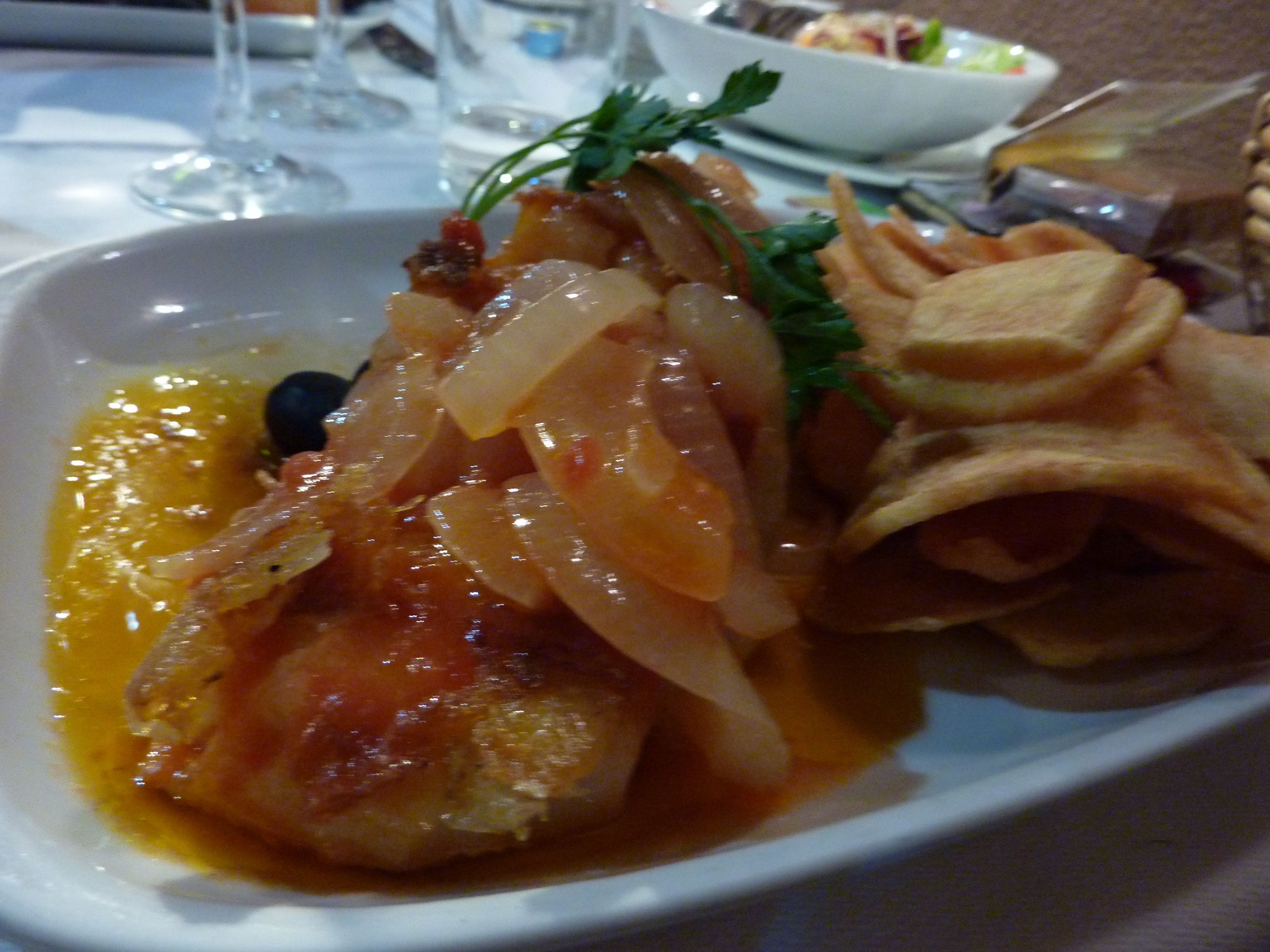 telero kun cepaĵo sur retoracia tablo